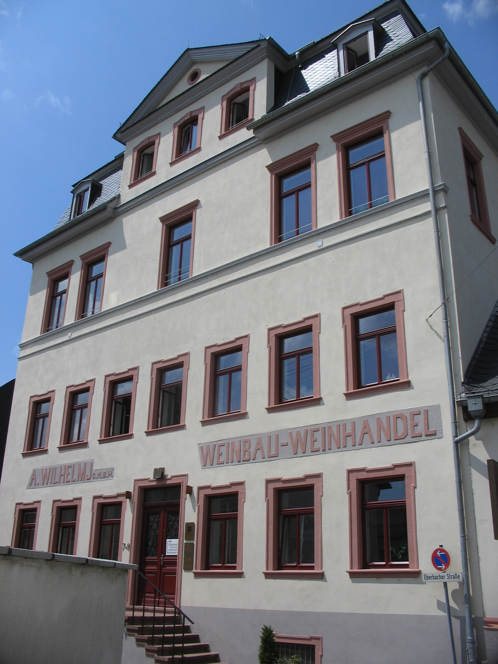 Haus Wilhelmj in der Eberbacherstraße in Hattenheim im Rheingau, Blick von Osten This is a photograph of an architectural monument.